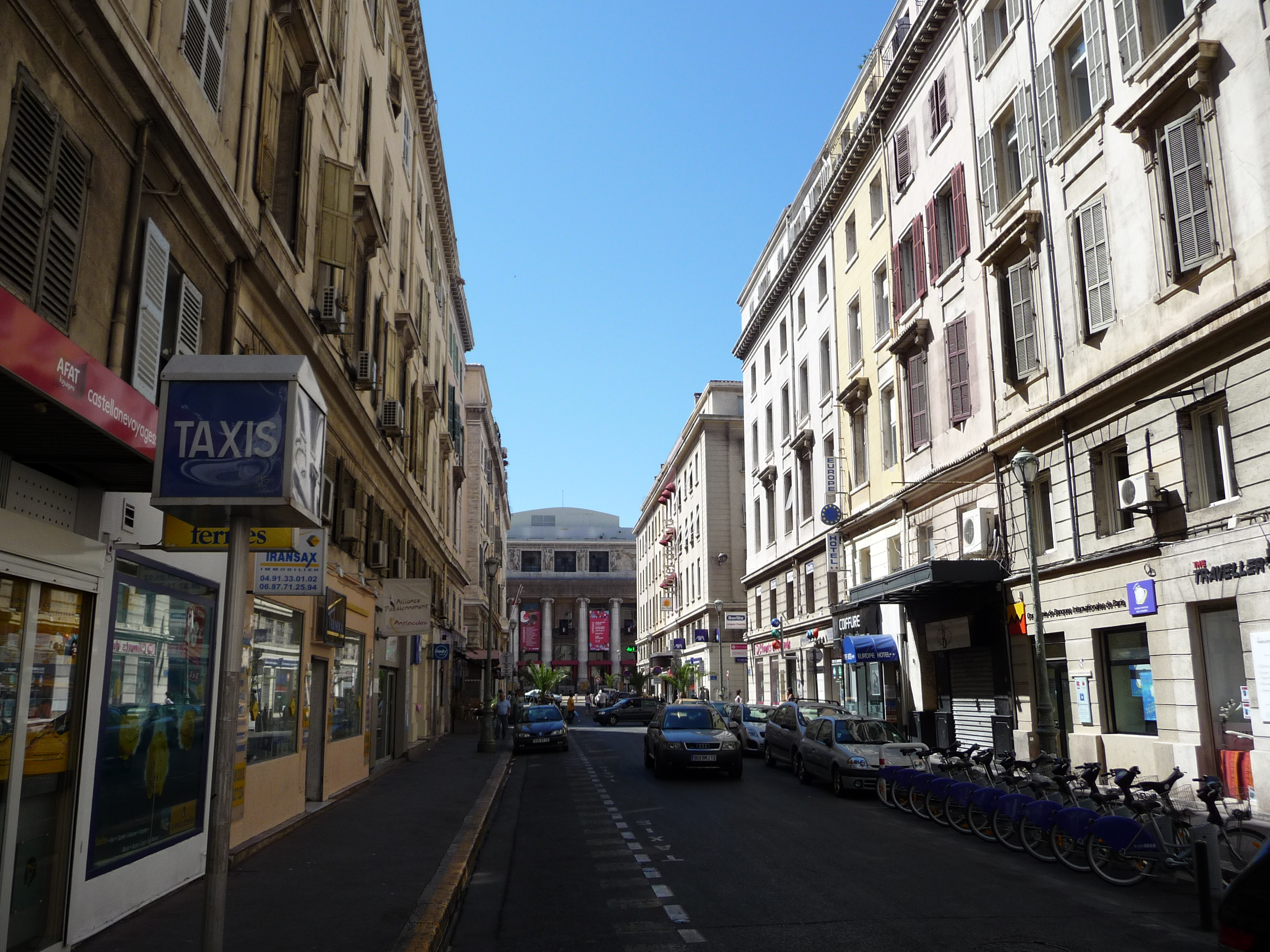 Opéra municipal de Marseille